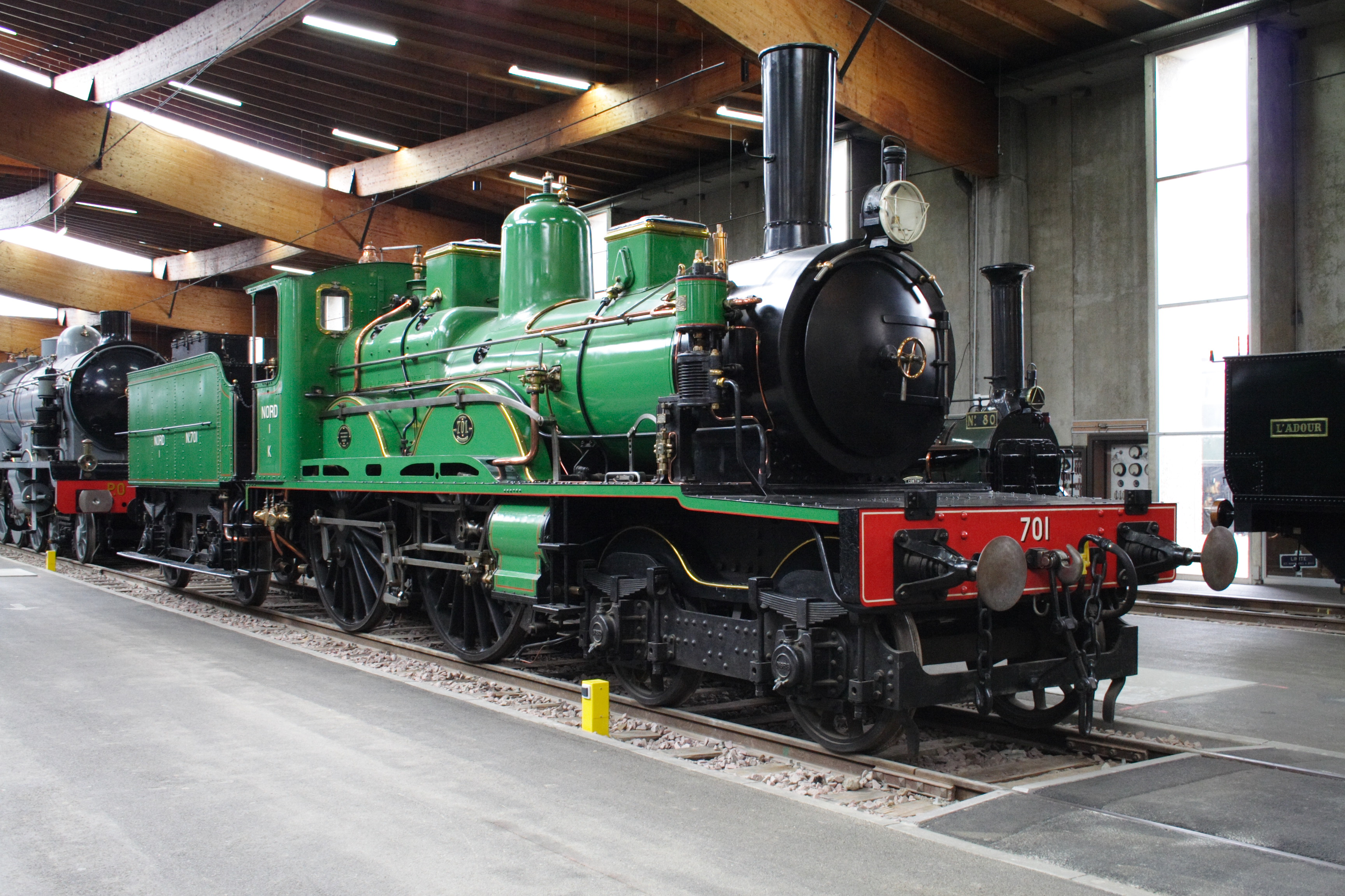 a steam locomotive "701 NORD" at the Cité du Train de Mulhouse(Mulhouse, France)